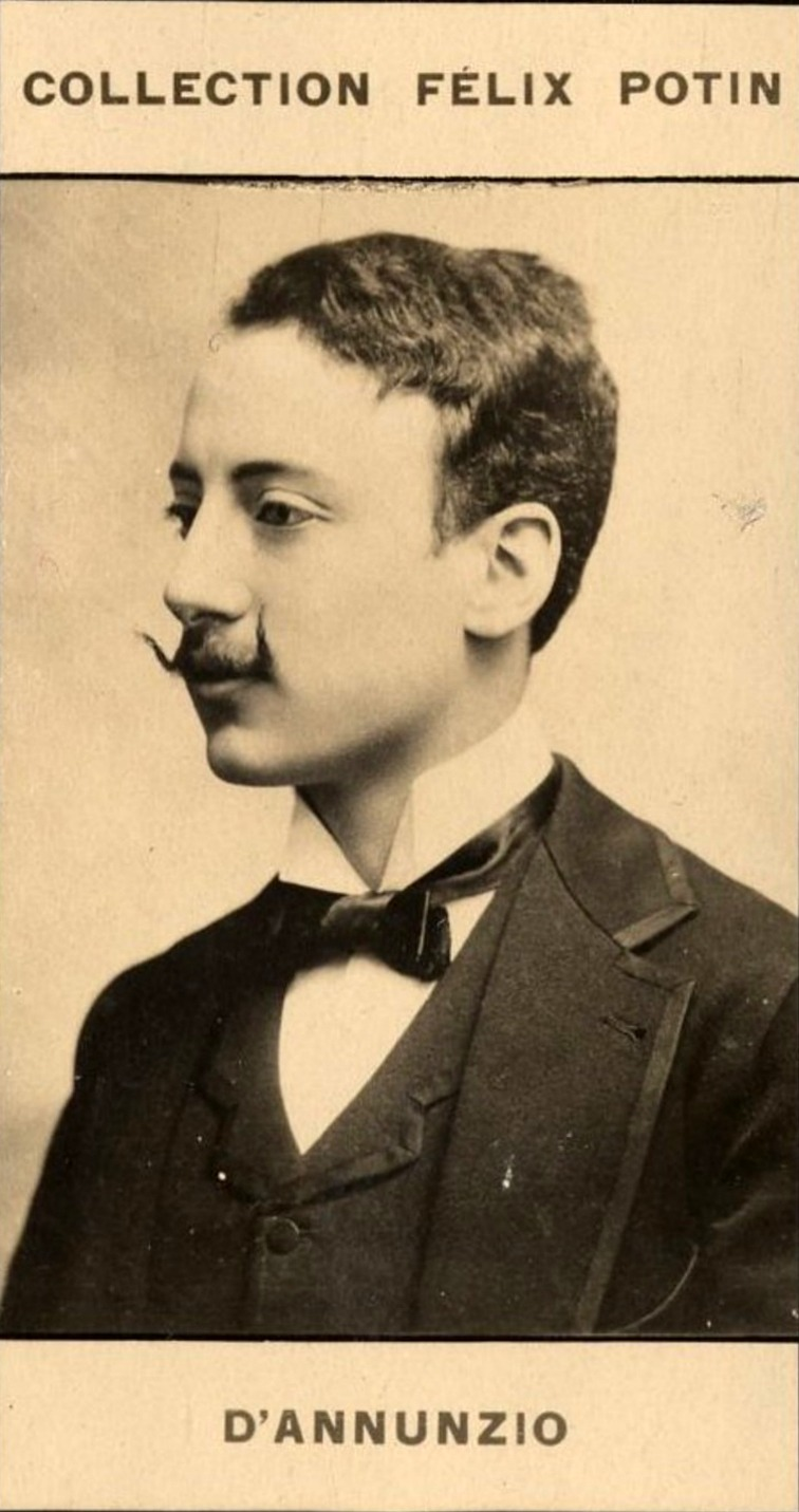 D'Annunzio